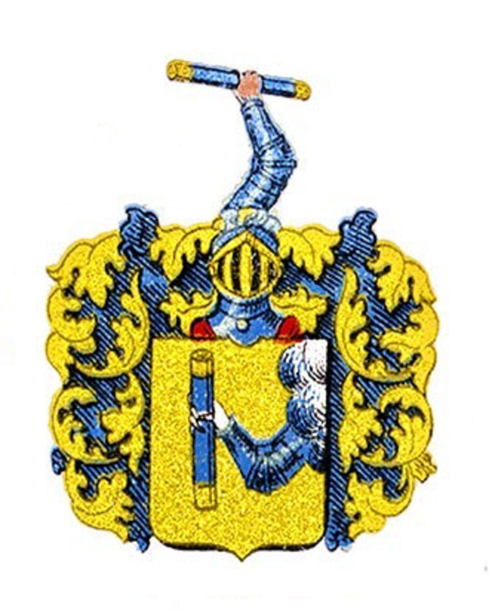 Wappen des Erik Slang (* 1600; † 23. Oktober 1642 in Leipzig), königlich-schwedischer Generalmajor im Dreißigjährigen Krieg. 1625 wurde er in die Adelsklasse der schwedischen Ritterschaft aufgenommen.